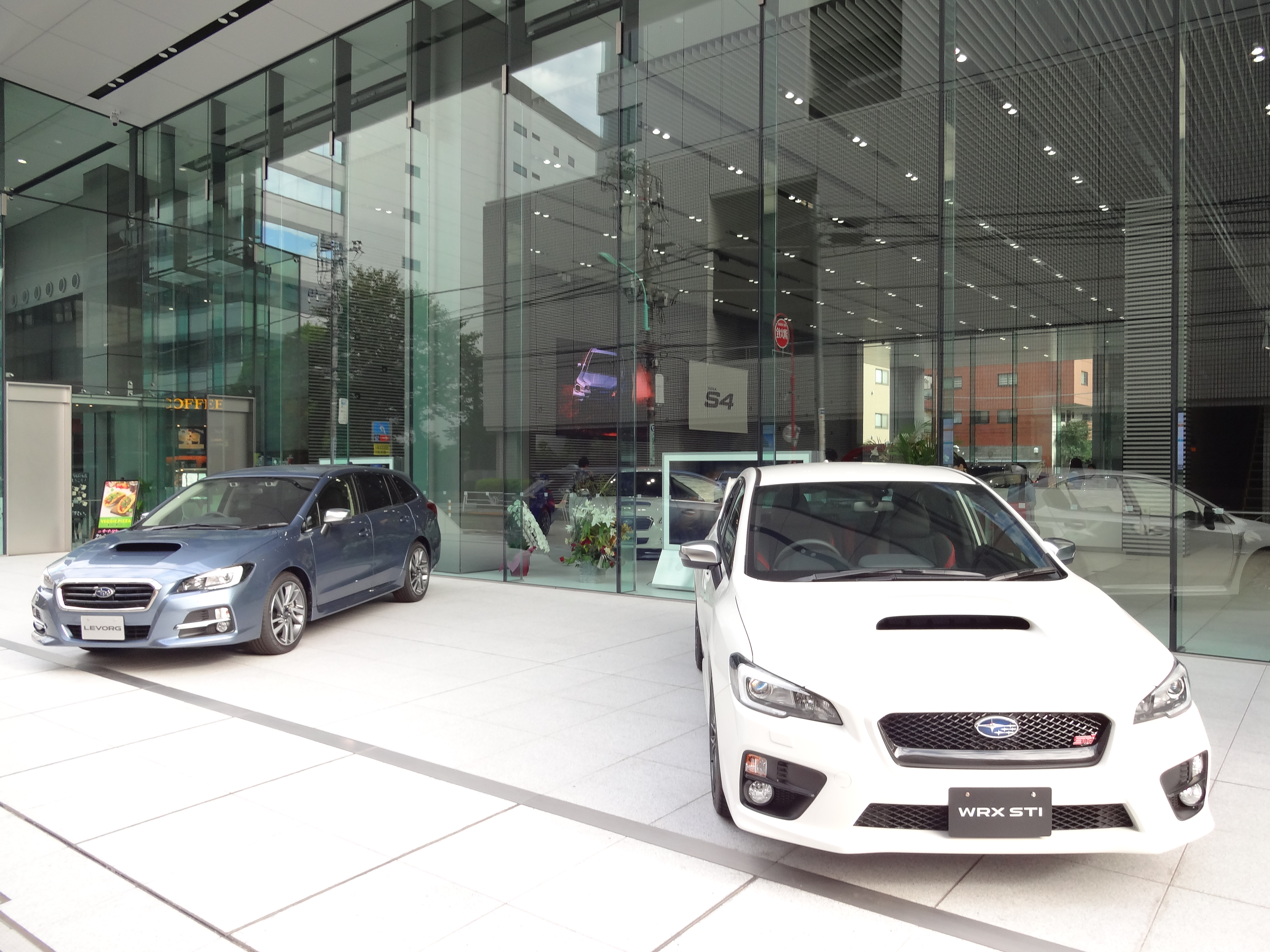 スバル恵比寿ショールーム。